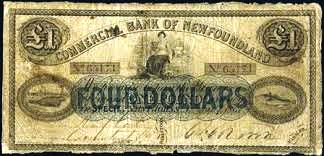 Fire-dollar pengeseddel fra Commercial Bank of Newfoundland